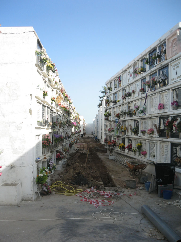 Cementerio de San Antonio Abad de Sanlúcar de Barrameda